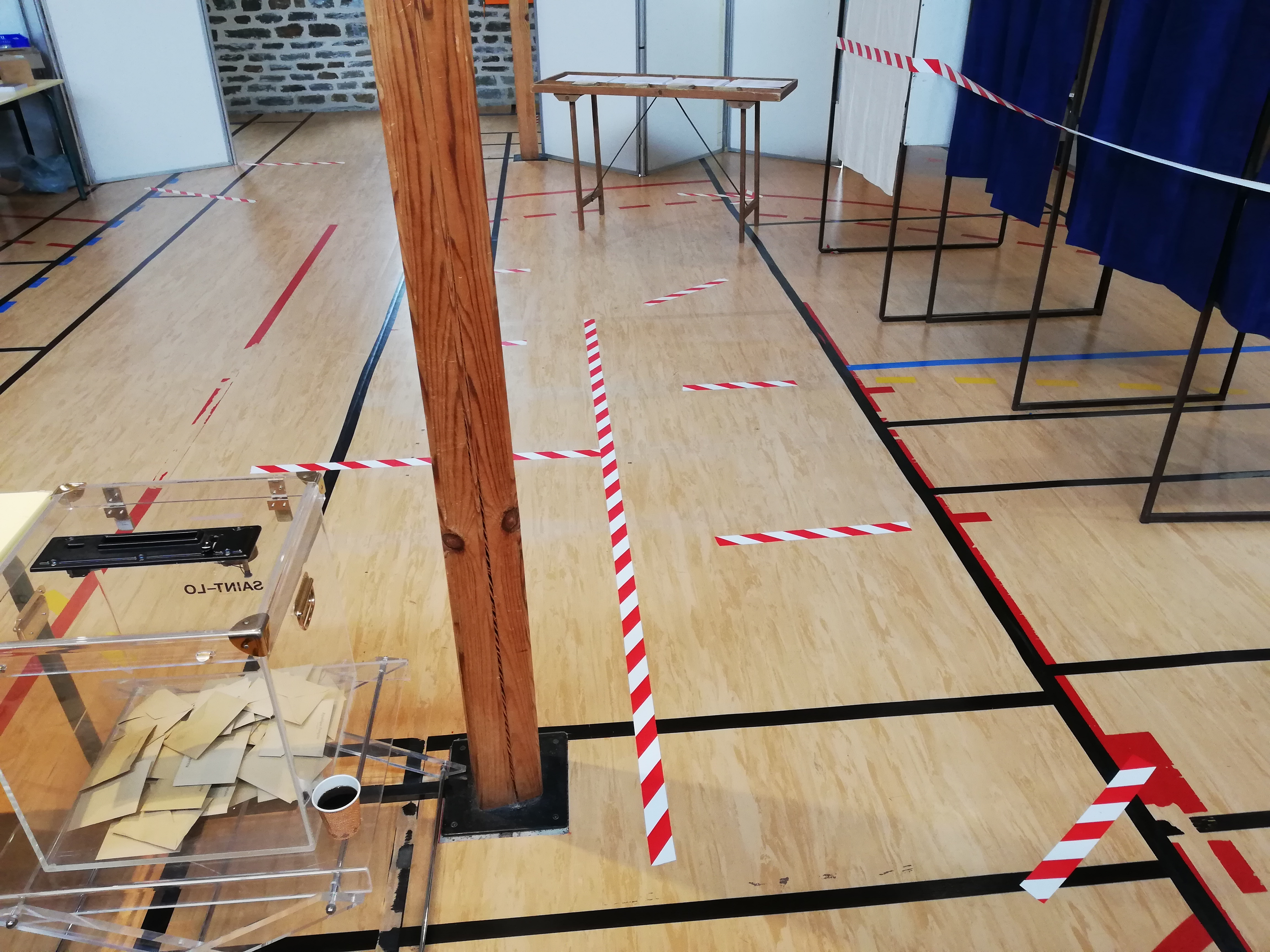 BV15 Bouloir pour le premier tour des élections municipales 2020 à Saint-Lô